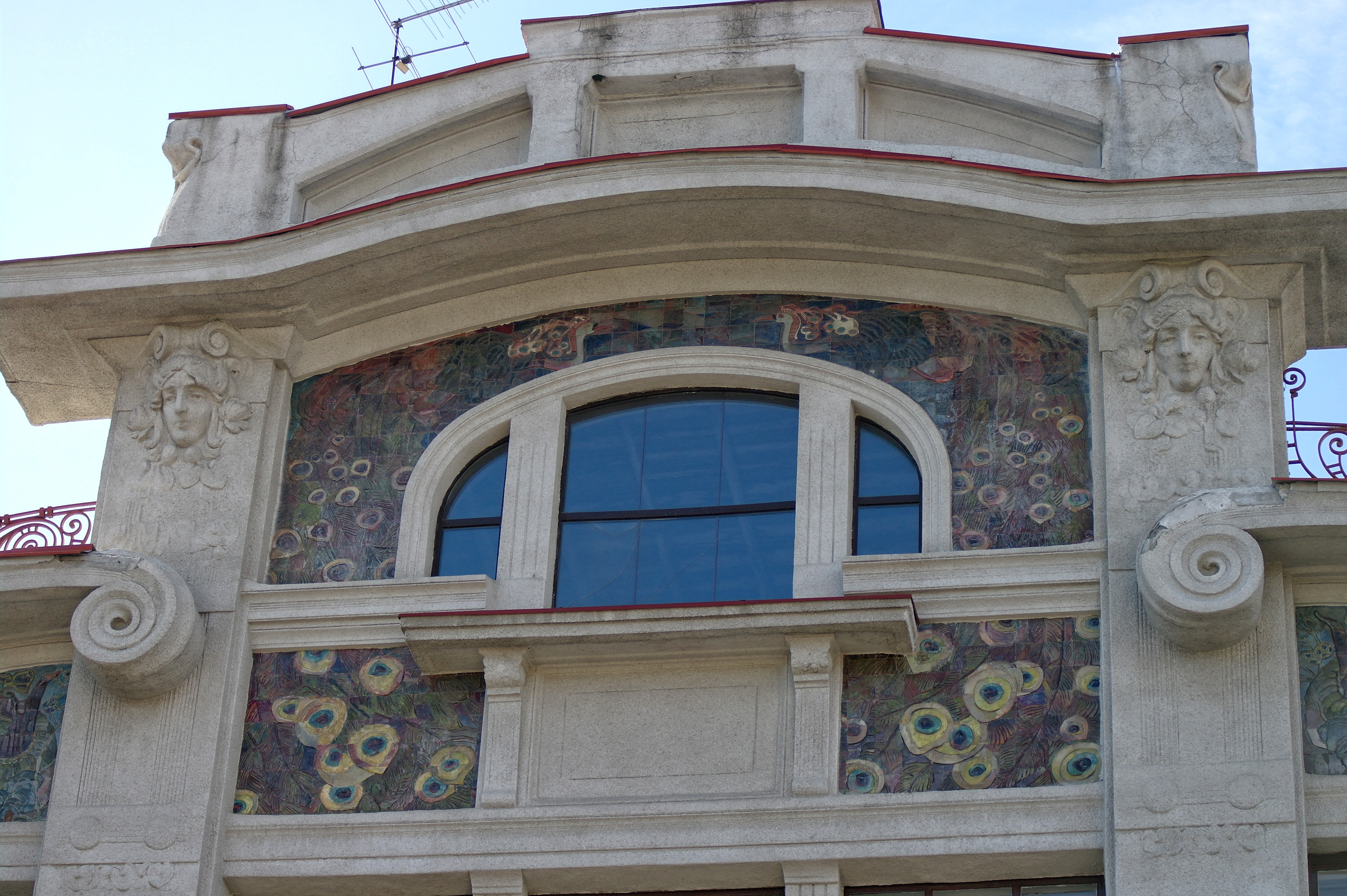 Харків, Різдвяна, 17 мануфактура